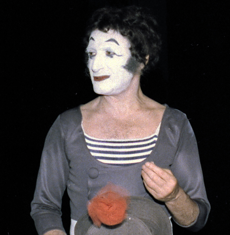 Mime Marcel Marceau, 06/16/1977 ARC Identifier: 175193 NLC-WHSP-C-01769-34